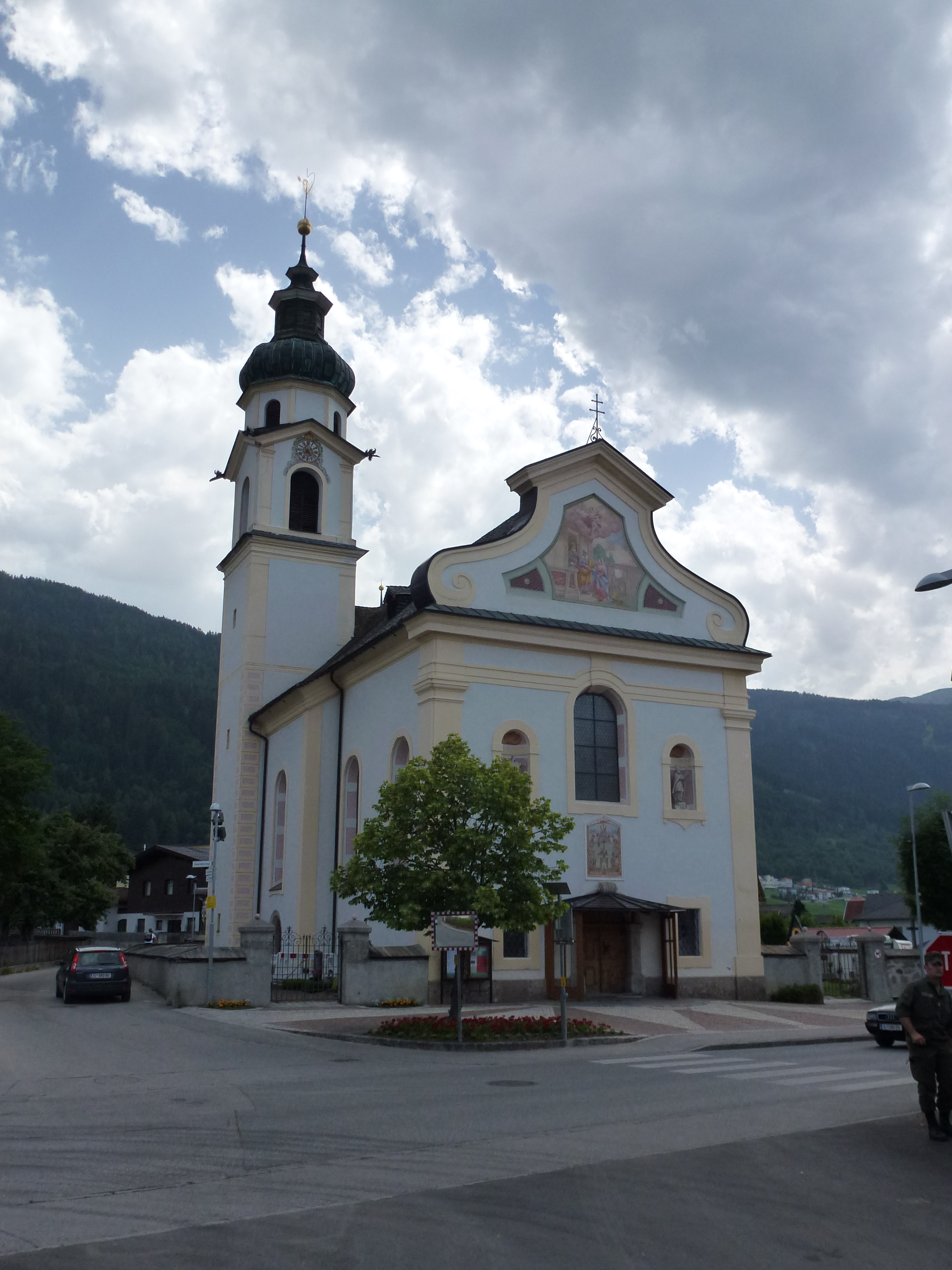 Kath. Pfarrkirche Mariä Heimsuchung und Friedhof - Dorfstraße, Birgitz